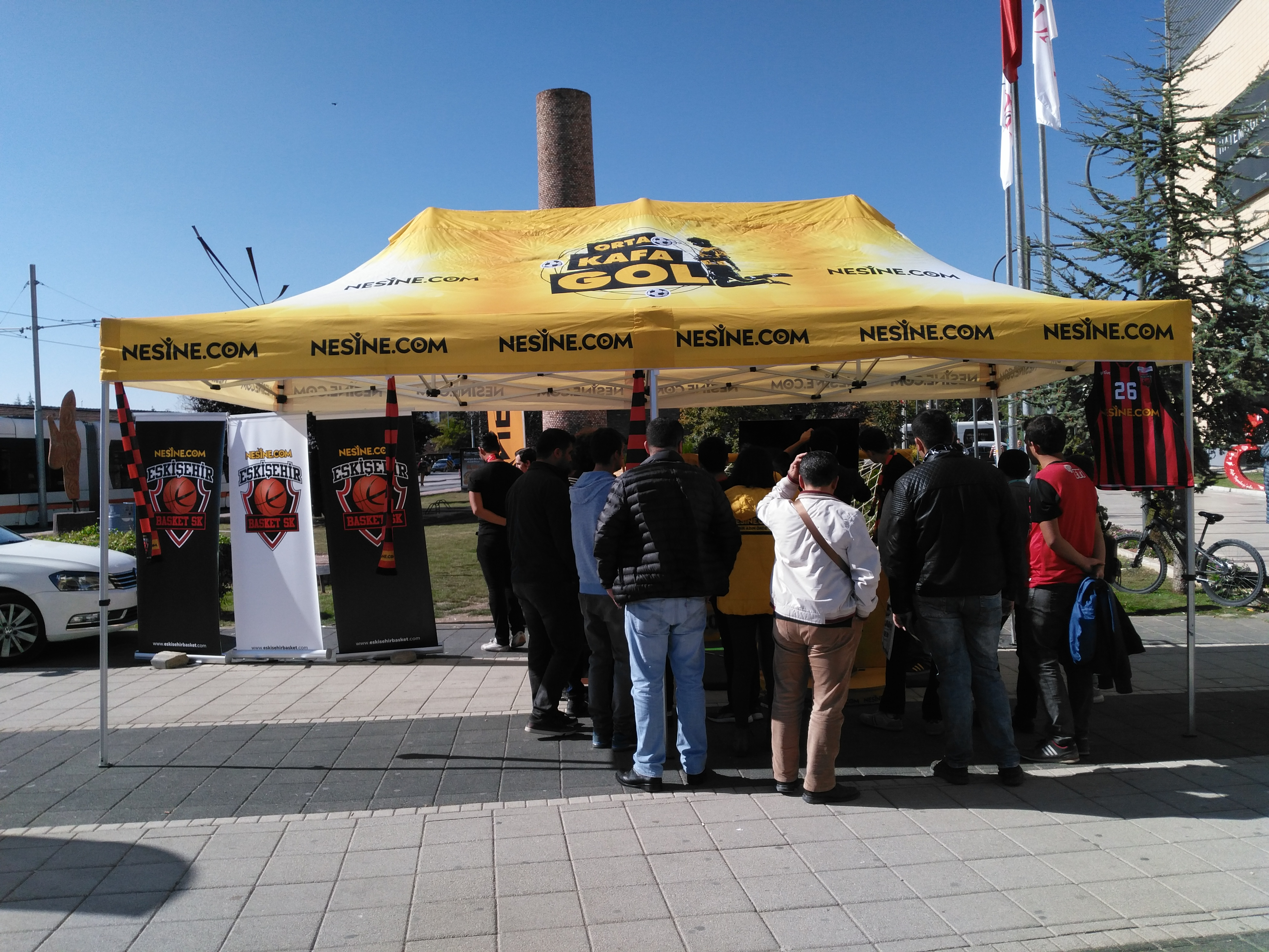 standı